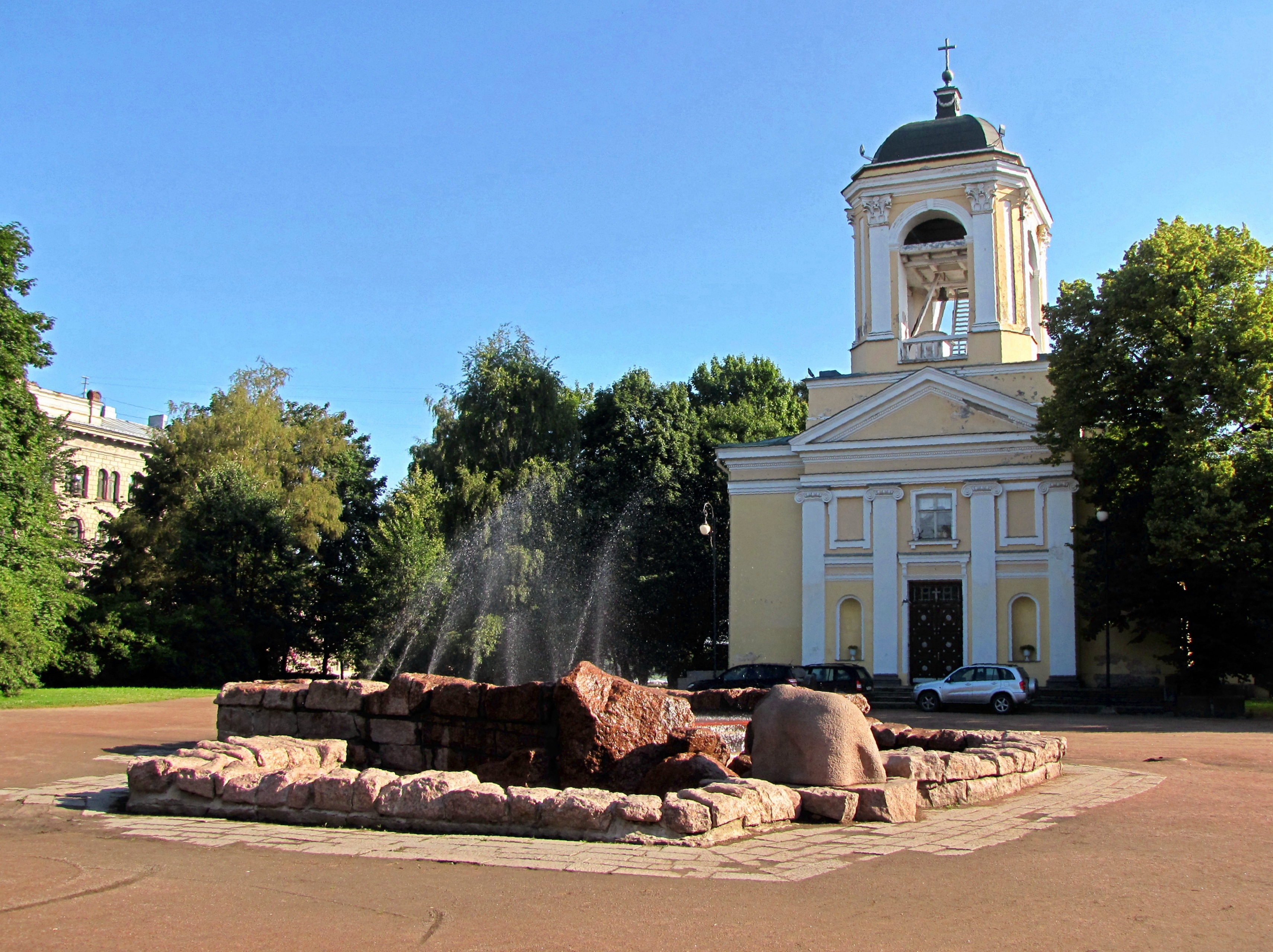 Лютеранский собор Св. Петра и Павла.